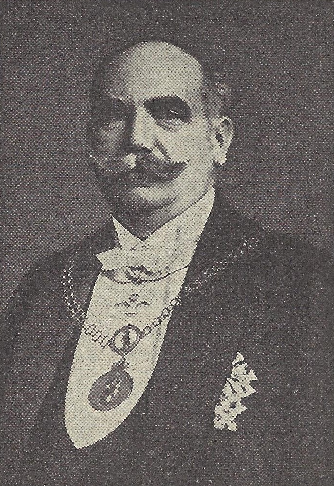 Photographic portrait of “Stadtältester Stadtbaurat a. D. von Berlin, Geheimer Baurat Dr. ing. h. c. Friedrich Krause”